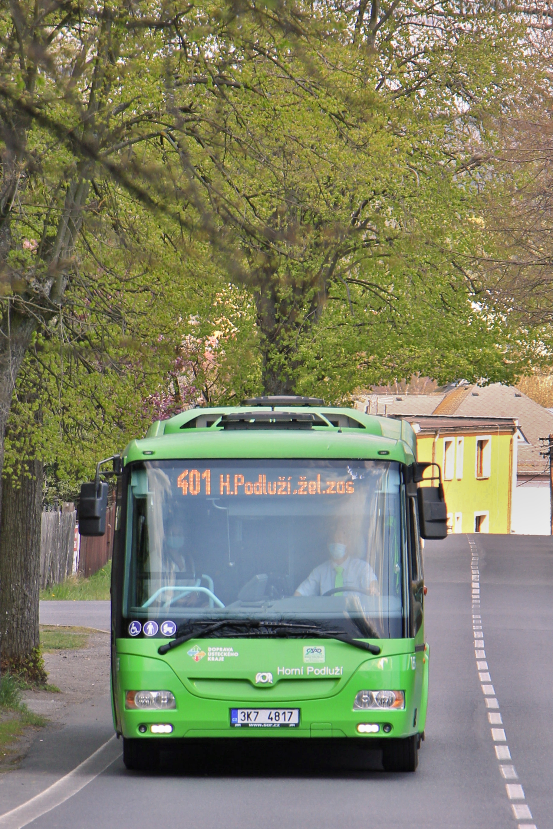 autobus SOR v zastávce Rumburk,, Krásnolipská